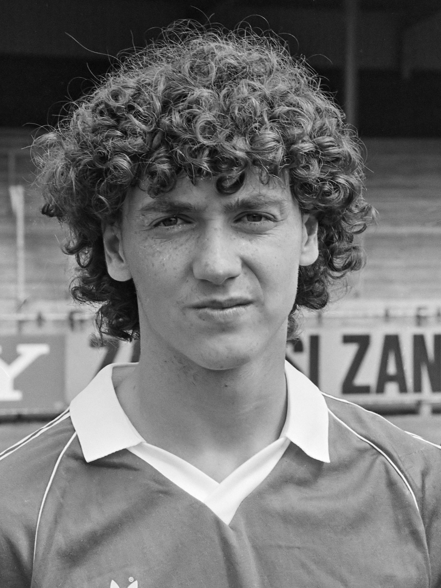 Persdag AZ 67; Jan Gaasbeek 4 augustus 1982